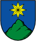 Český Šternberk - znak obce.